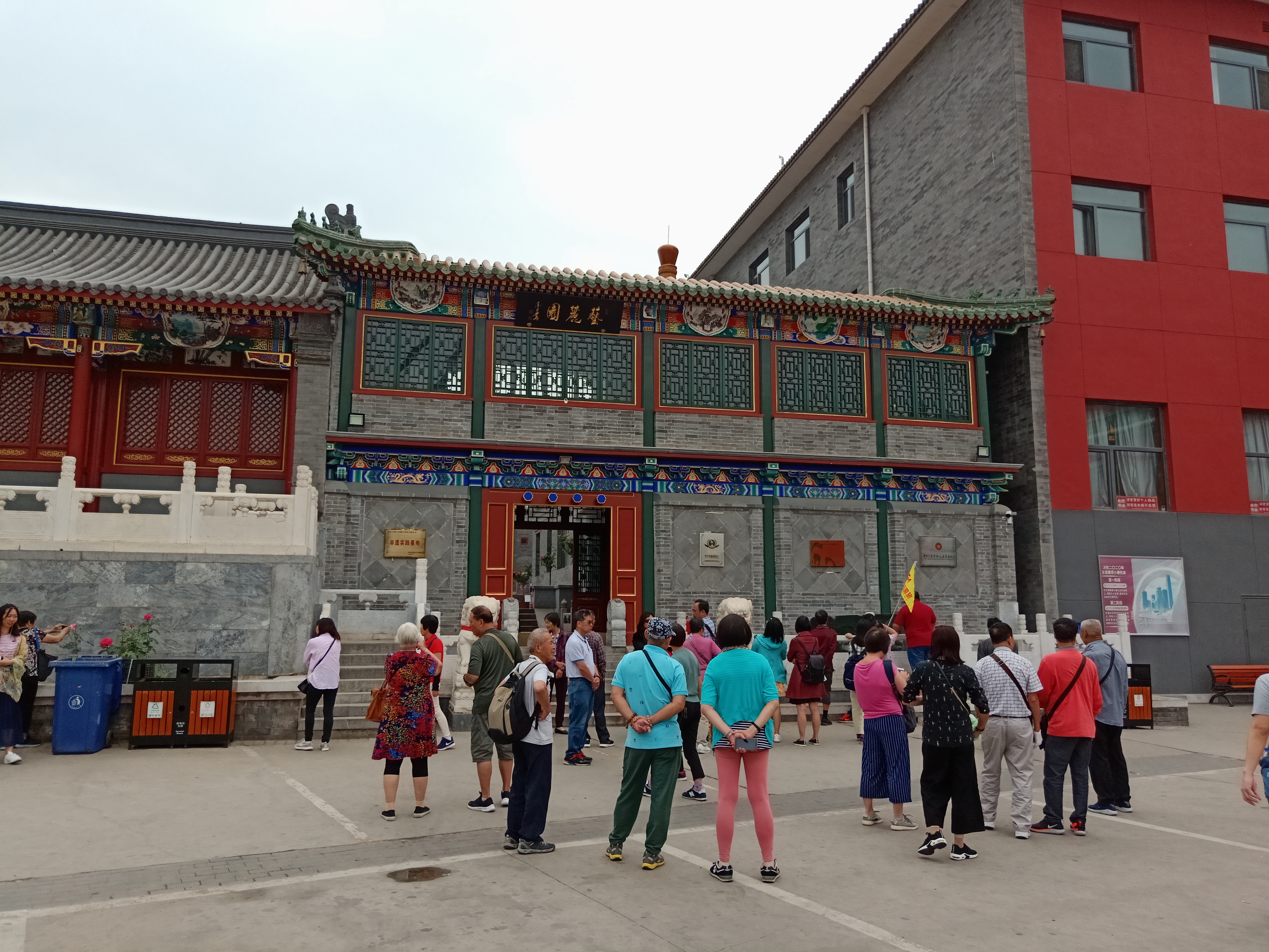 粵語: 藝麓園嘅入口